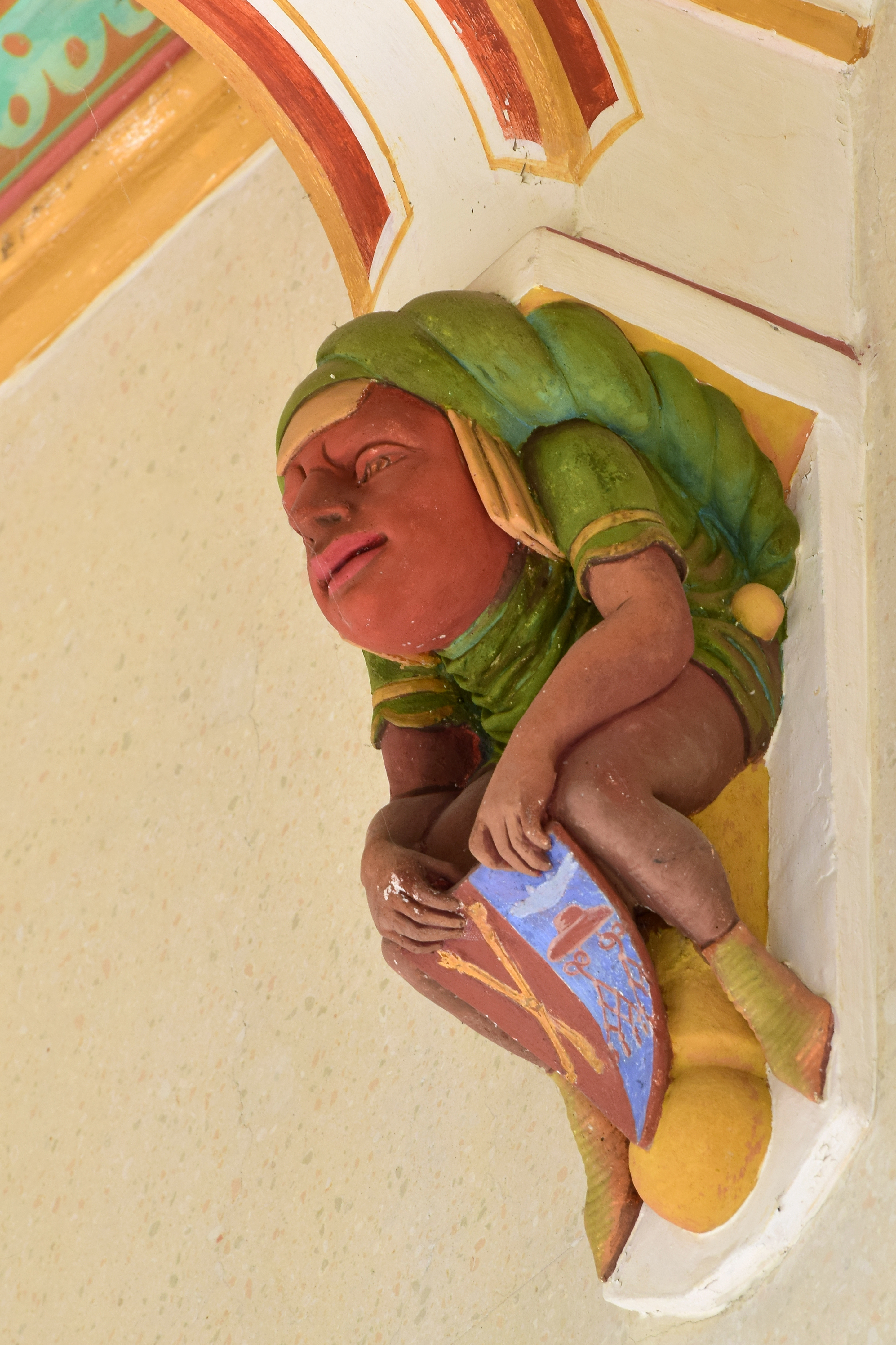 Konsolenfiguren im Schloss Grafenegg